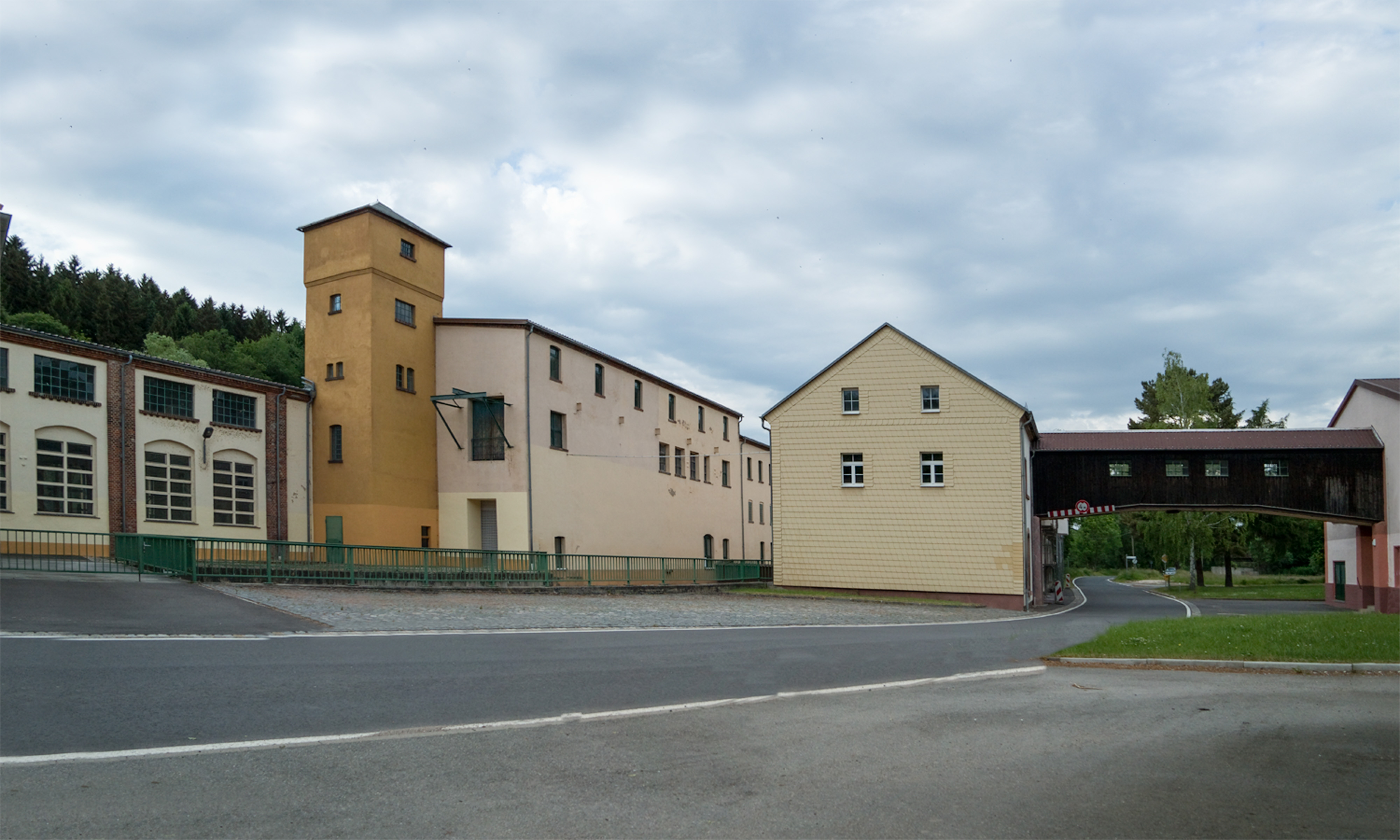 Lastauer Mühle, von 1950 bis 1990 Papierfabrik, jetzt ein Fensterwerk